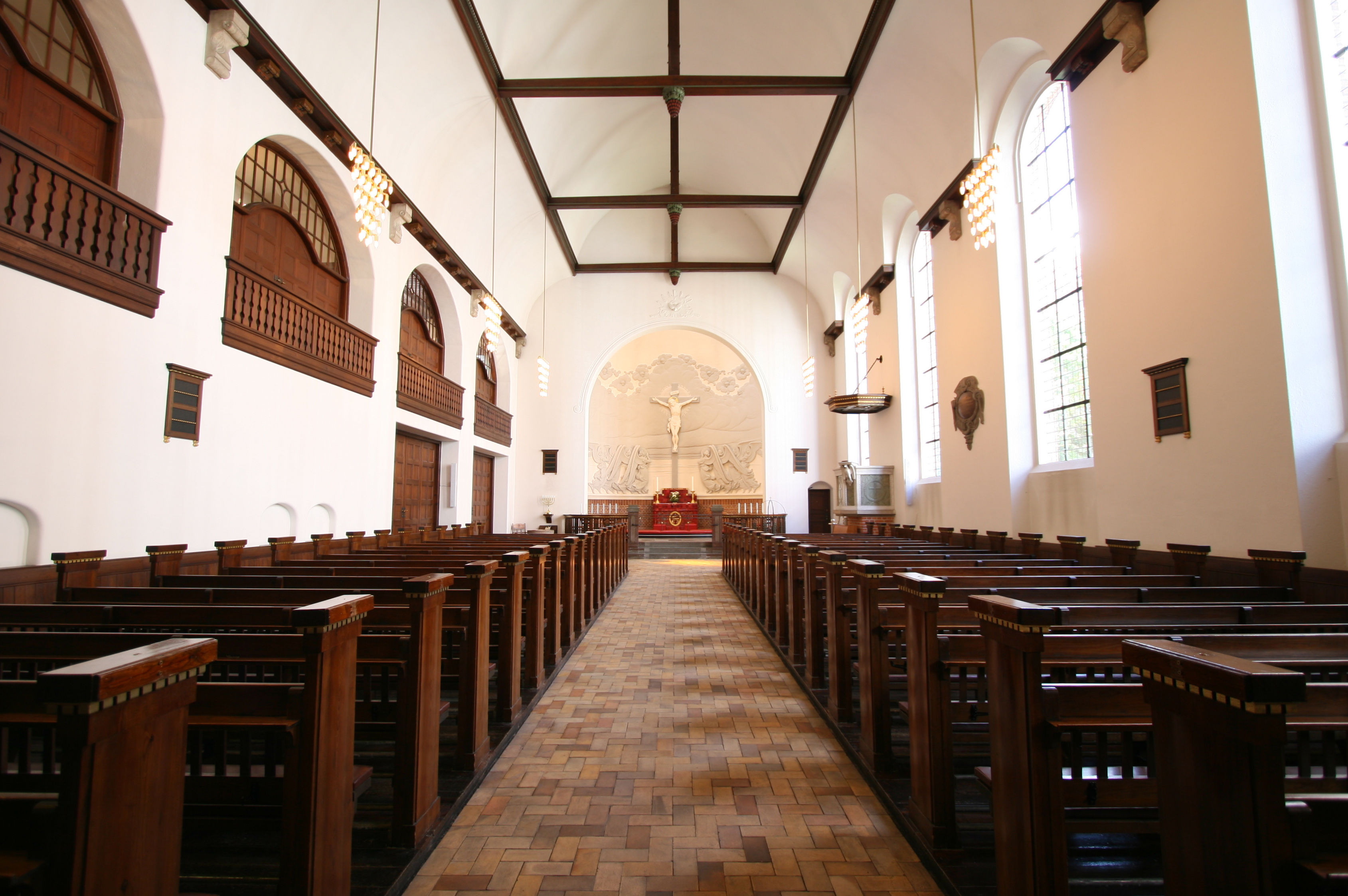 Godthaabskirken in Copenhagen, Denmark. Interior.